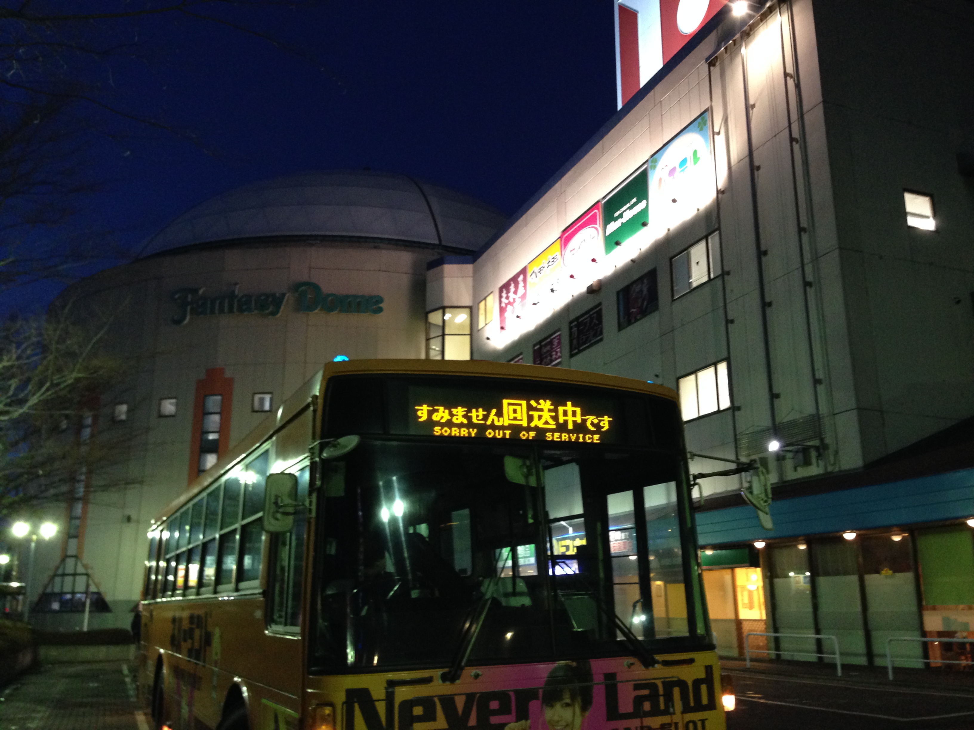 夜のラピアバスターミナルと回送表示している南部バス